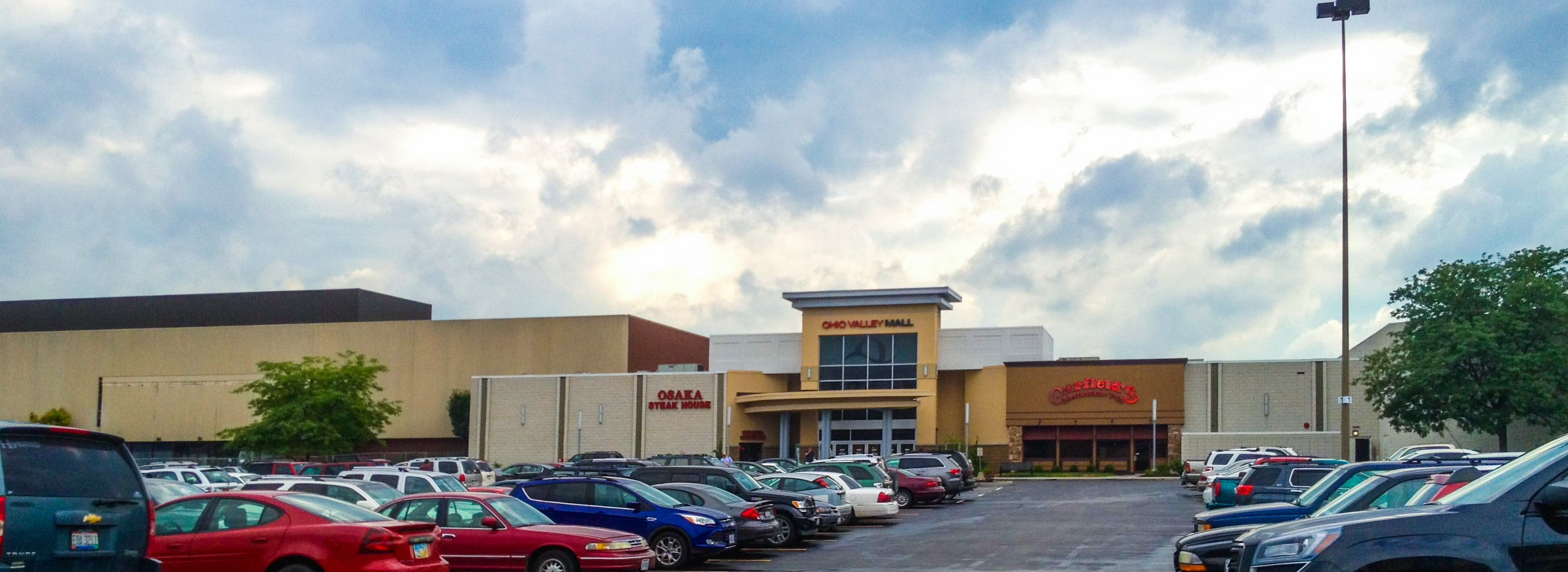 Ohio Valley Mall